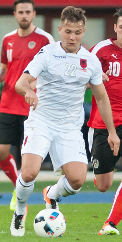 Wien, 26.03.2016, ÖFB Laenderspiel Oesterreich vs Albanien. Bild zeigt Amir Abrashi (ALB).